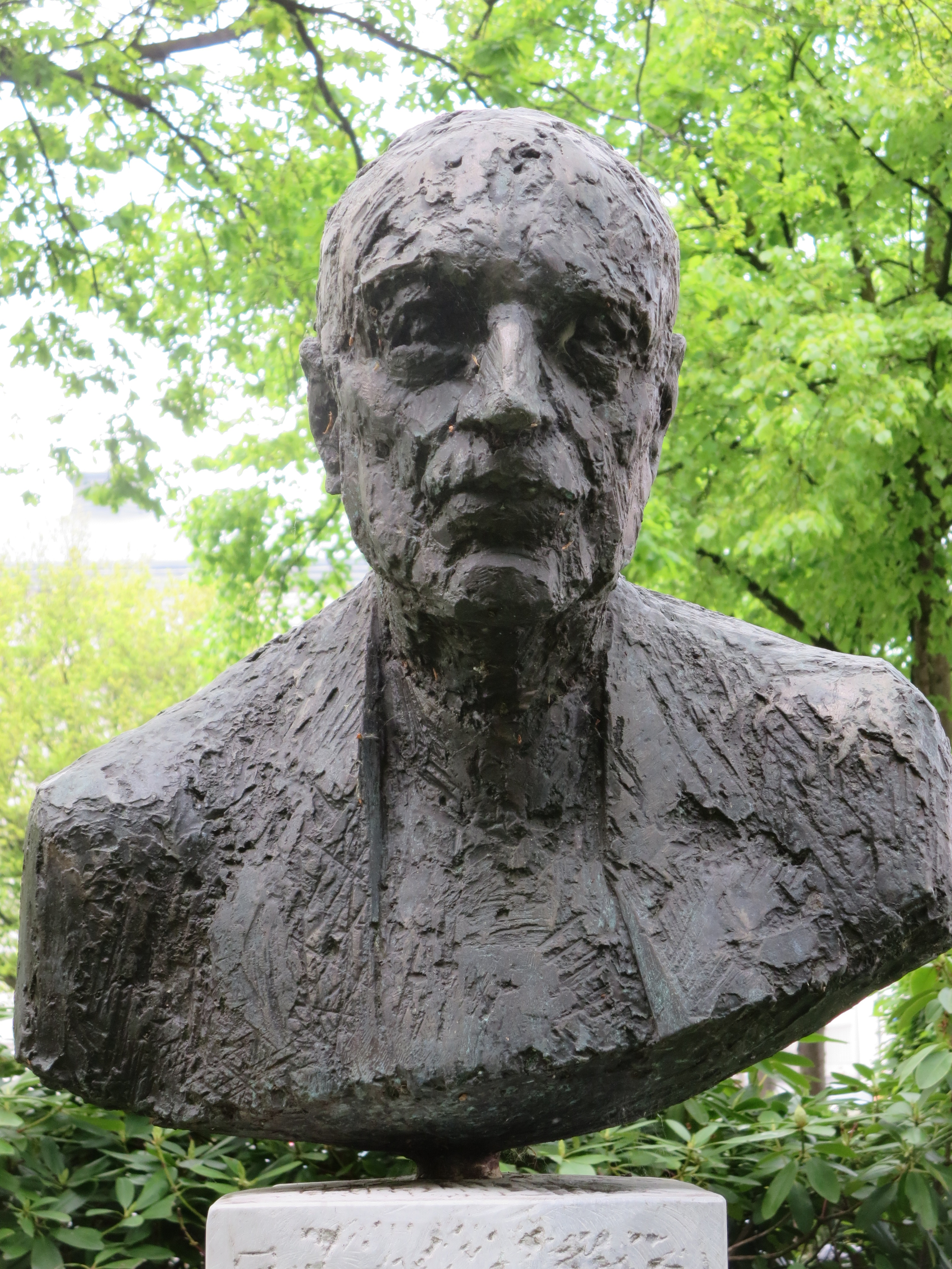 Rudolf Bultmann, Porträtbüste von Michael Mohns, 2002